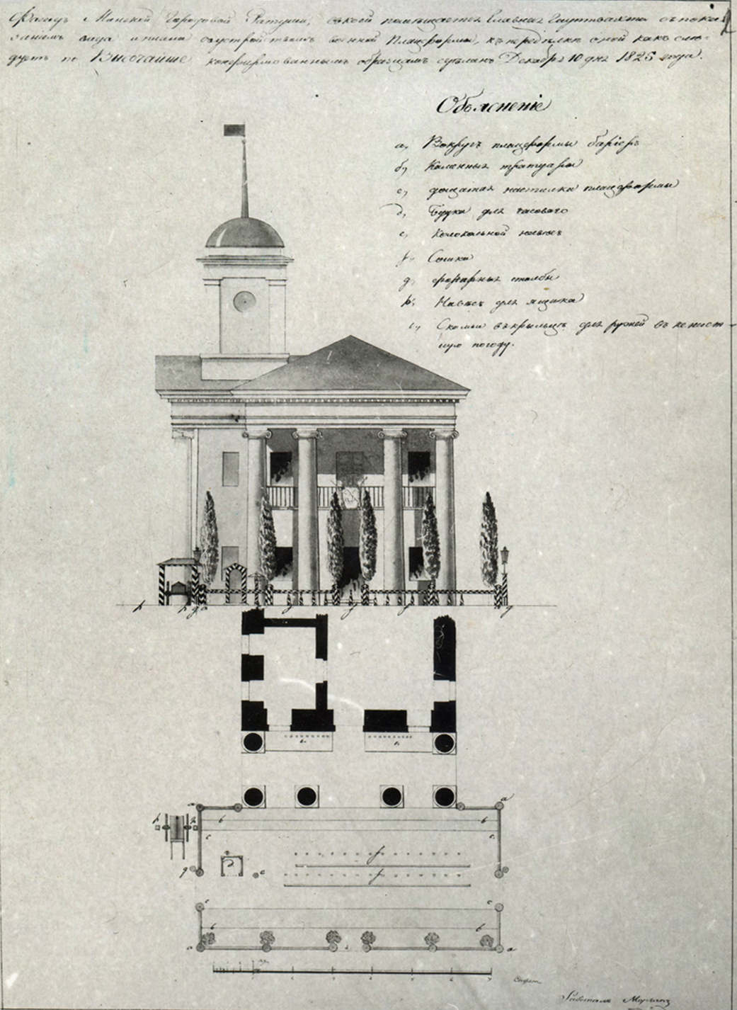 Беларуская (тарашкевіца): Менск (Miensk), пляц Высокі Рынак (plac Vysoki Rynak). Ратуша